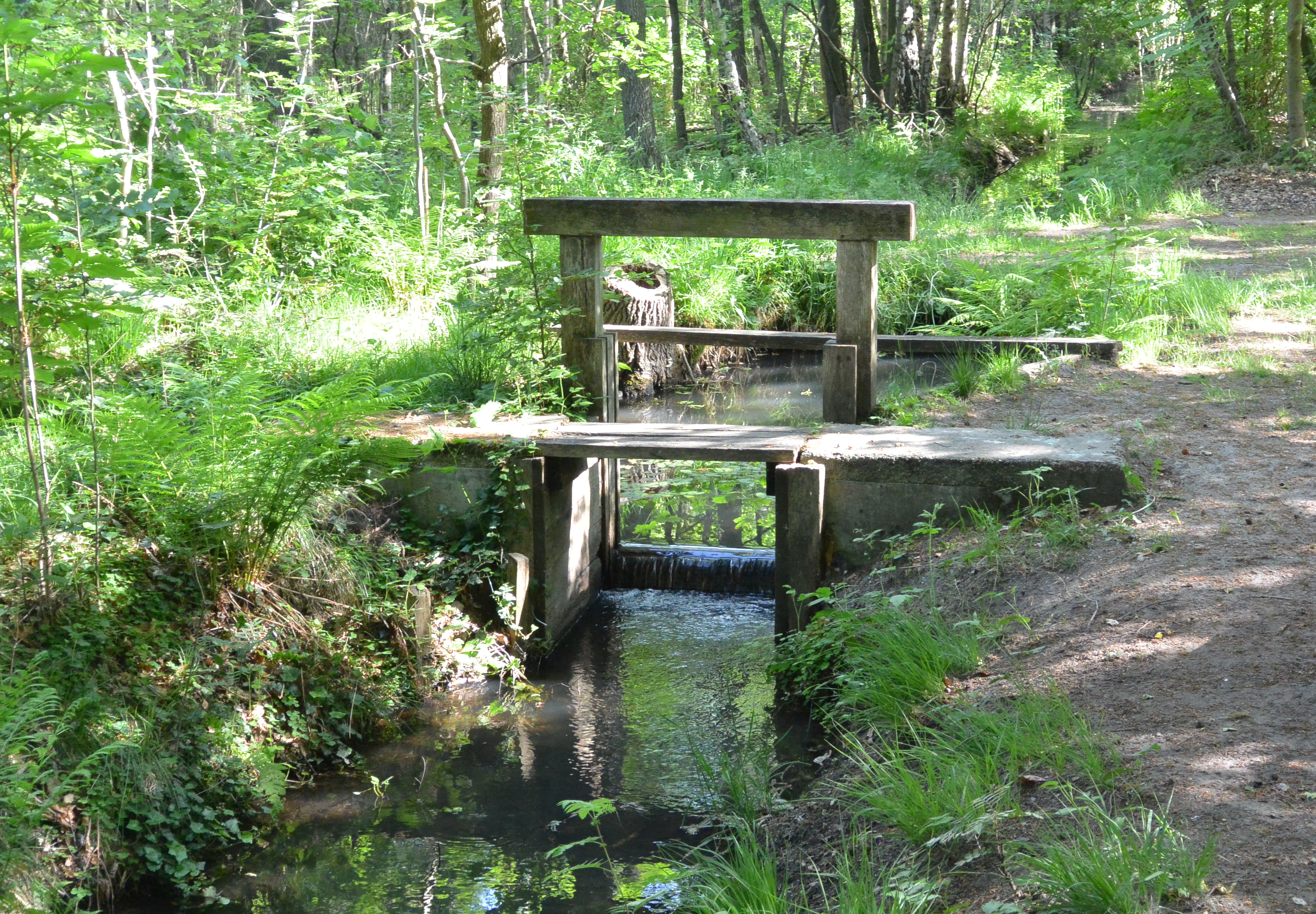 Das Naturschutzgebiet Altes Schleifer Teichgelände ist eine kleinteilig parzellierte Landschaft aus Mischwäldern und landwirtschaftlichen Flächen. Es ist von vielen Gräben und Fließen durchzogen, die zur Struga entwässern. Wehre (Schütze) wie dieses hier helfen dabei den Wasserhaushalt zu regulieren und den verschiedenen Ansprüchen an Naturschutz sowie land- und forstwirtschaftlicher Nutzung gerecht zu werden.